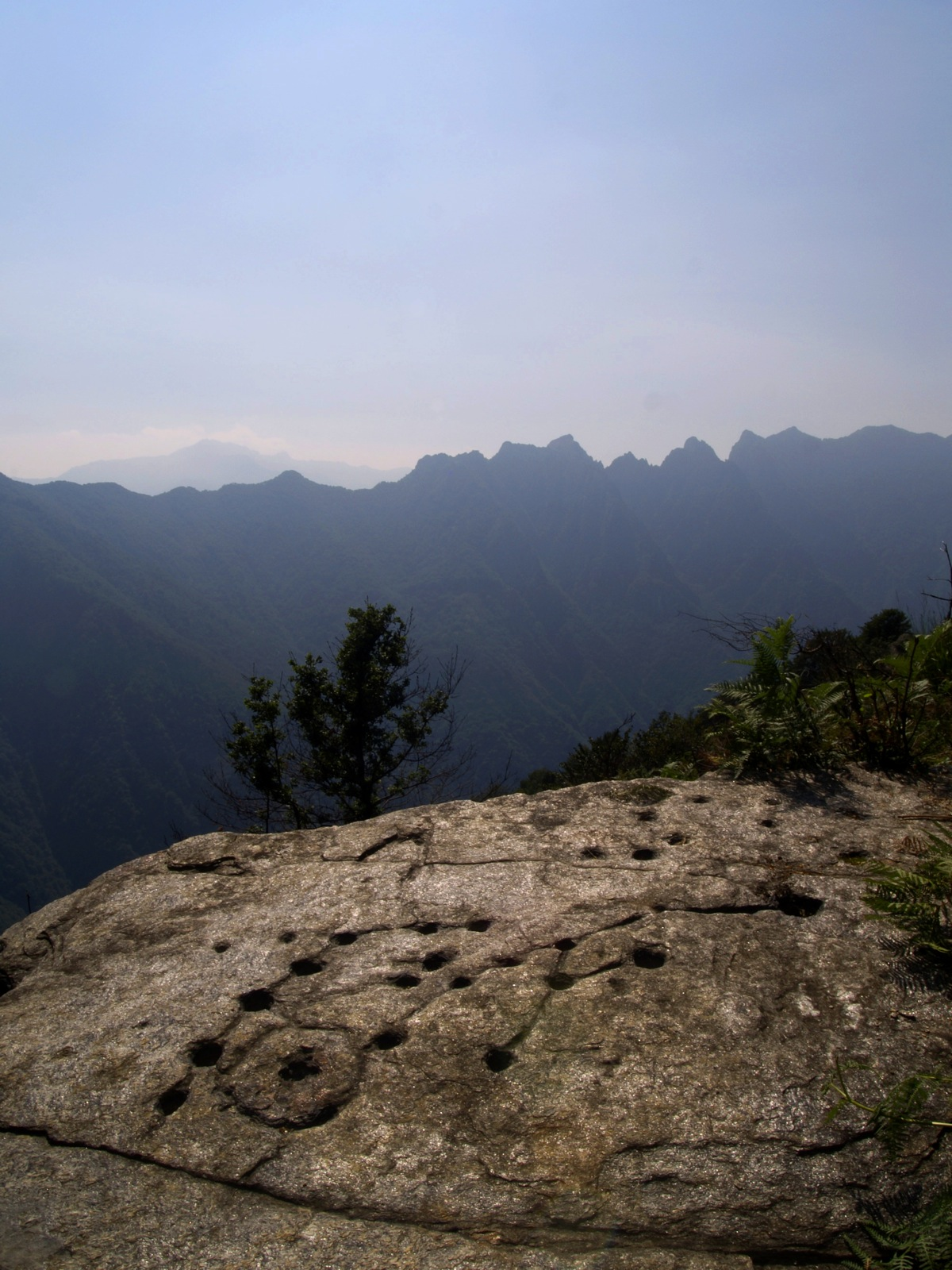 (covinhas, cupmarks, fossettes) Anche questa è Valgrande: incisioni rupestri sul "Masso Altare". Alpe Prà - Parco Nazionale Valgrande - ITALY